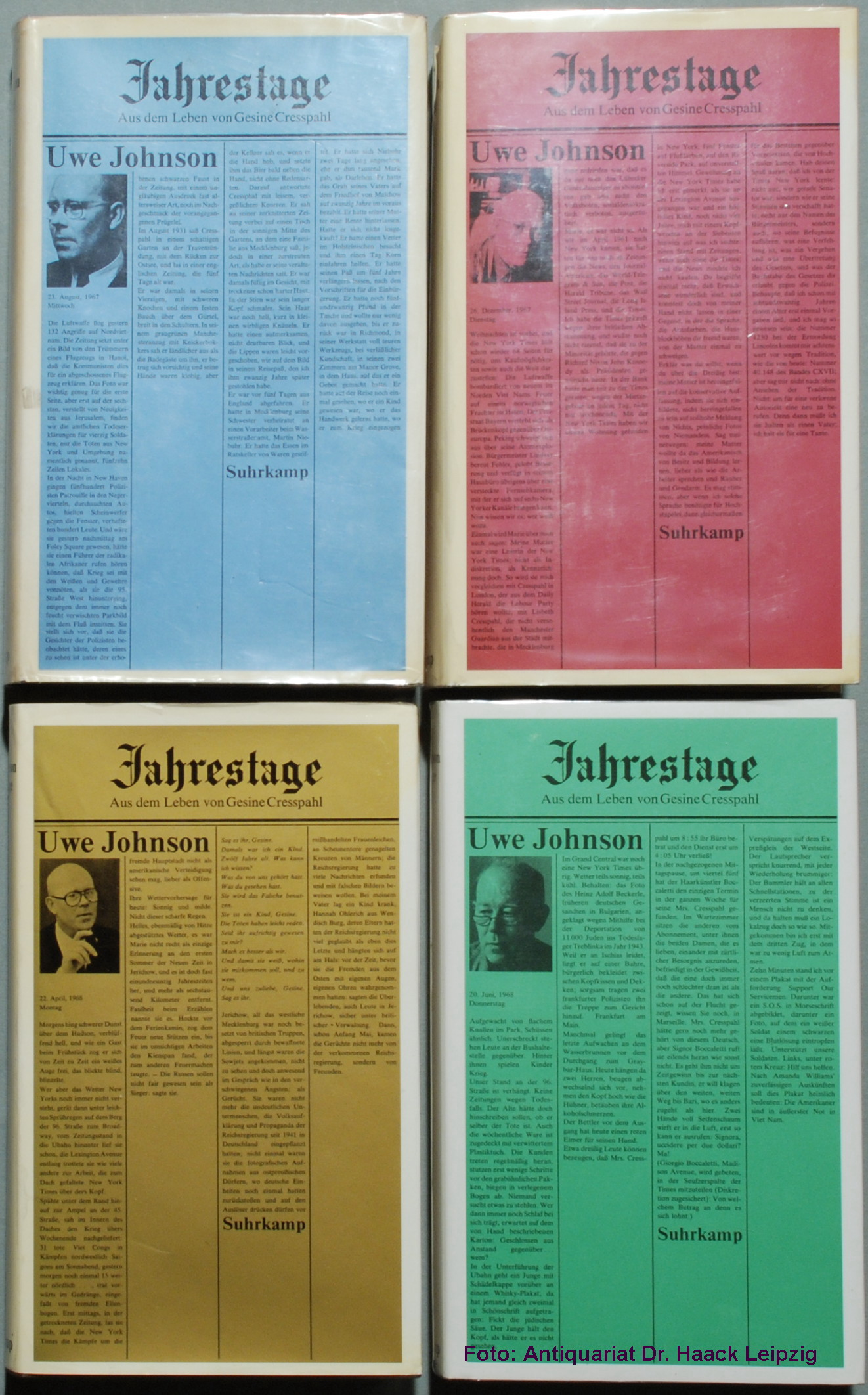 Main: Johnson, Uwe: Jahrestage. Aus dem Leben von Gesine Cresspahl, 4 Bände. Frankfurt am Main: Suhrkamp 1970, 1971, 1973 u. 1983. Erstausgaben (Wilpert/Gühring² 11, 13, 14 u. 23) Orig.-Umschläge [in Klarsichtfolie eingeschlagen].